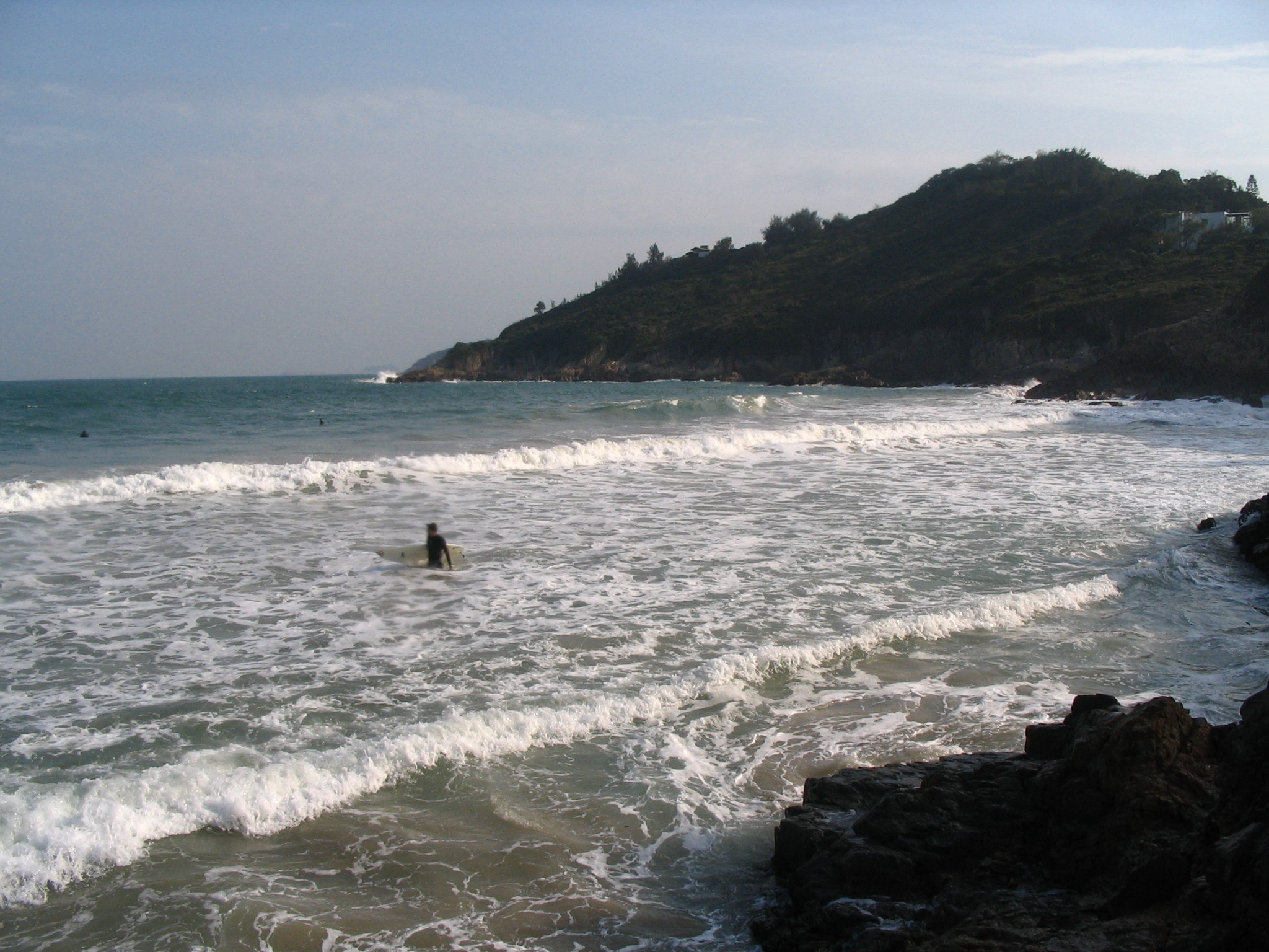 Photo of Big Wave Bay, Hong Kong Island